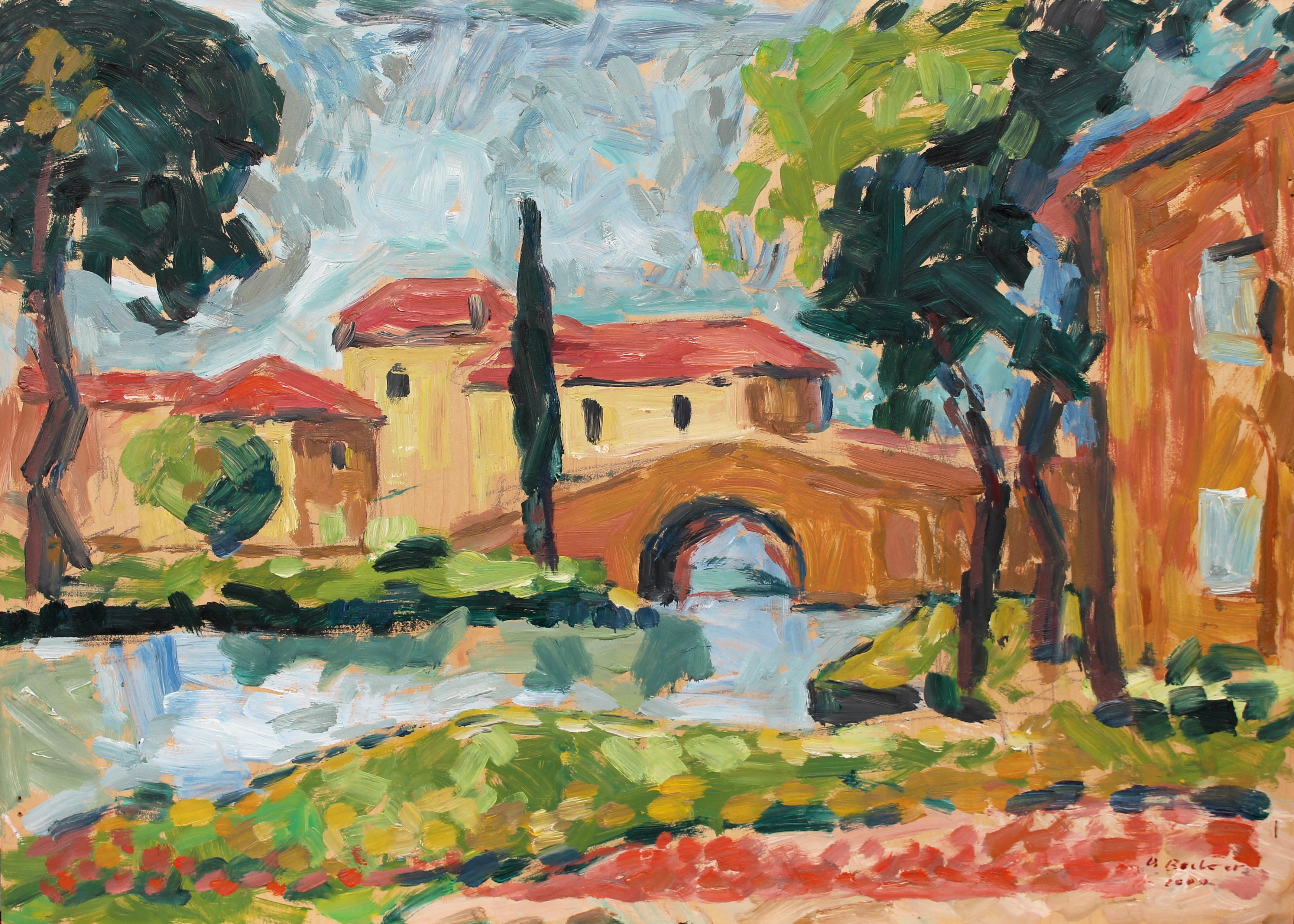 Landschaft Frankreich